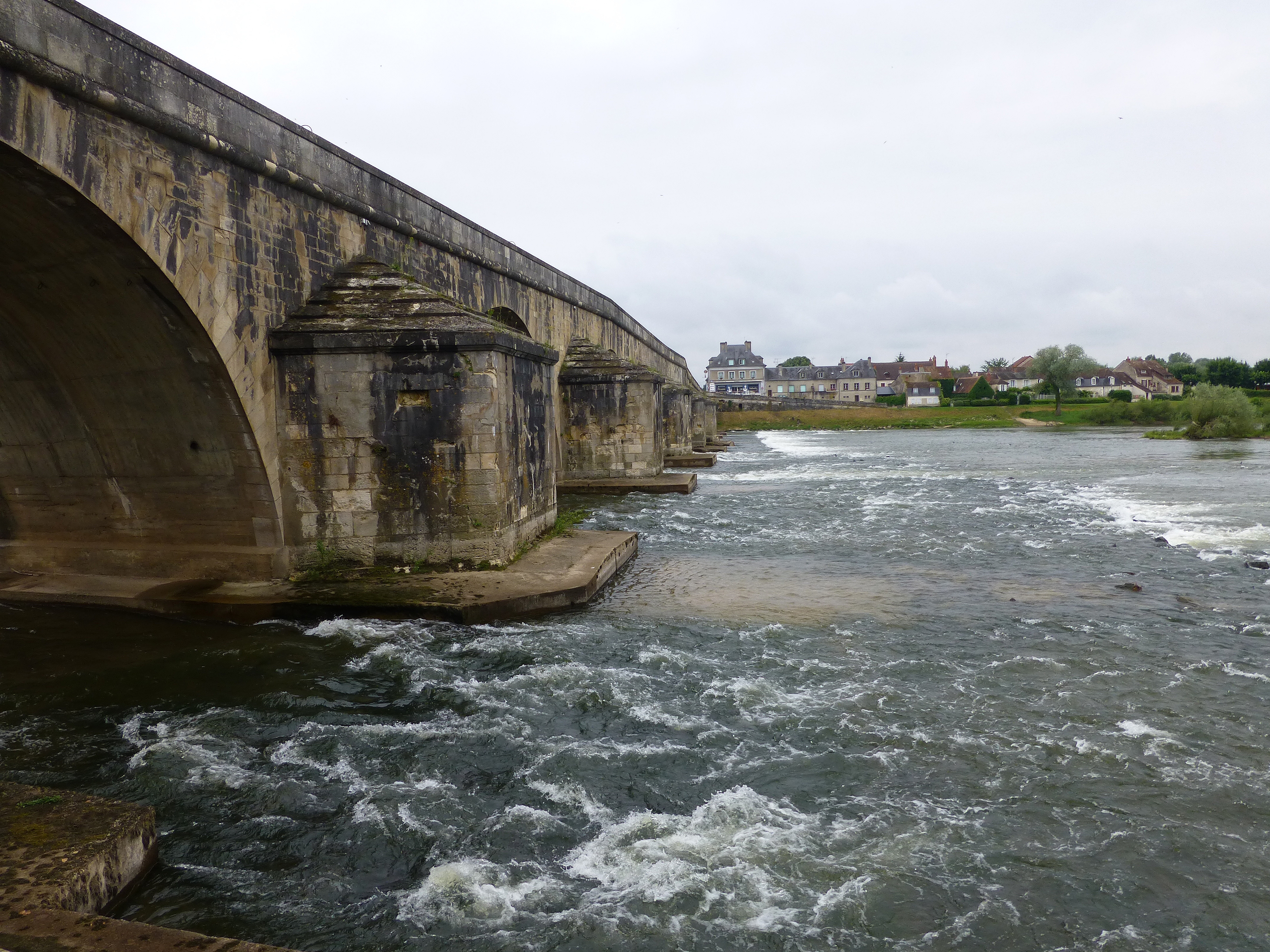 Grand pont à La Charité-sur-Loire (Nièvre)